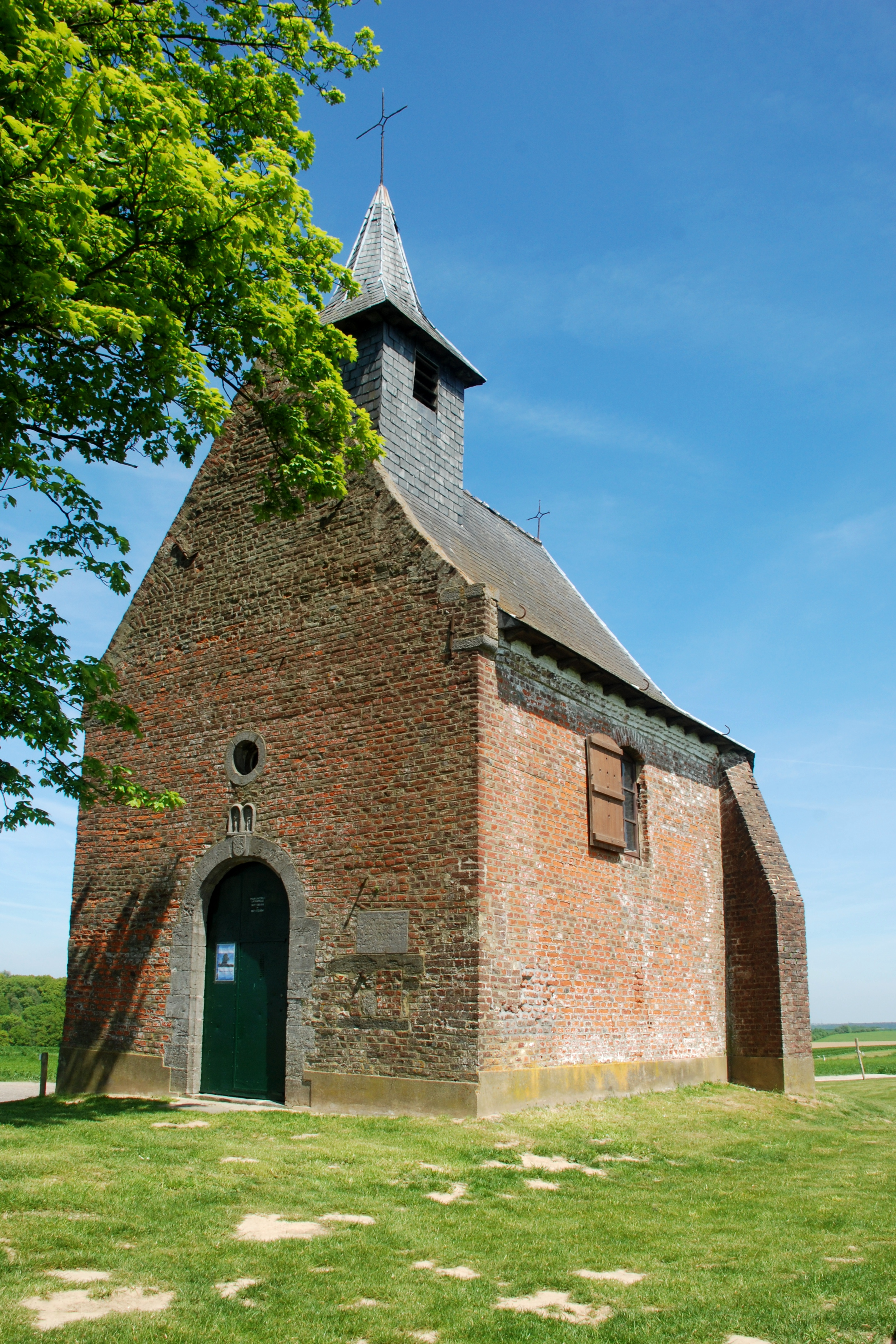 Belgique - Bousval - Chapelle du Try-au-Chêne